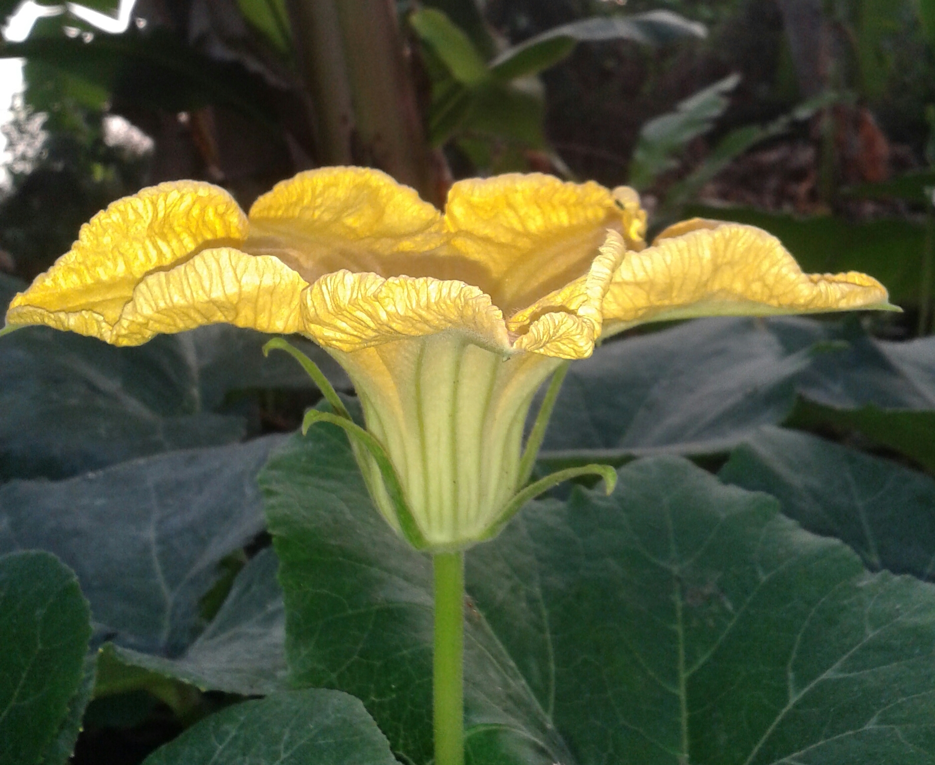 മത്തൻ ആണ്‍ പൂവ്